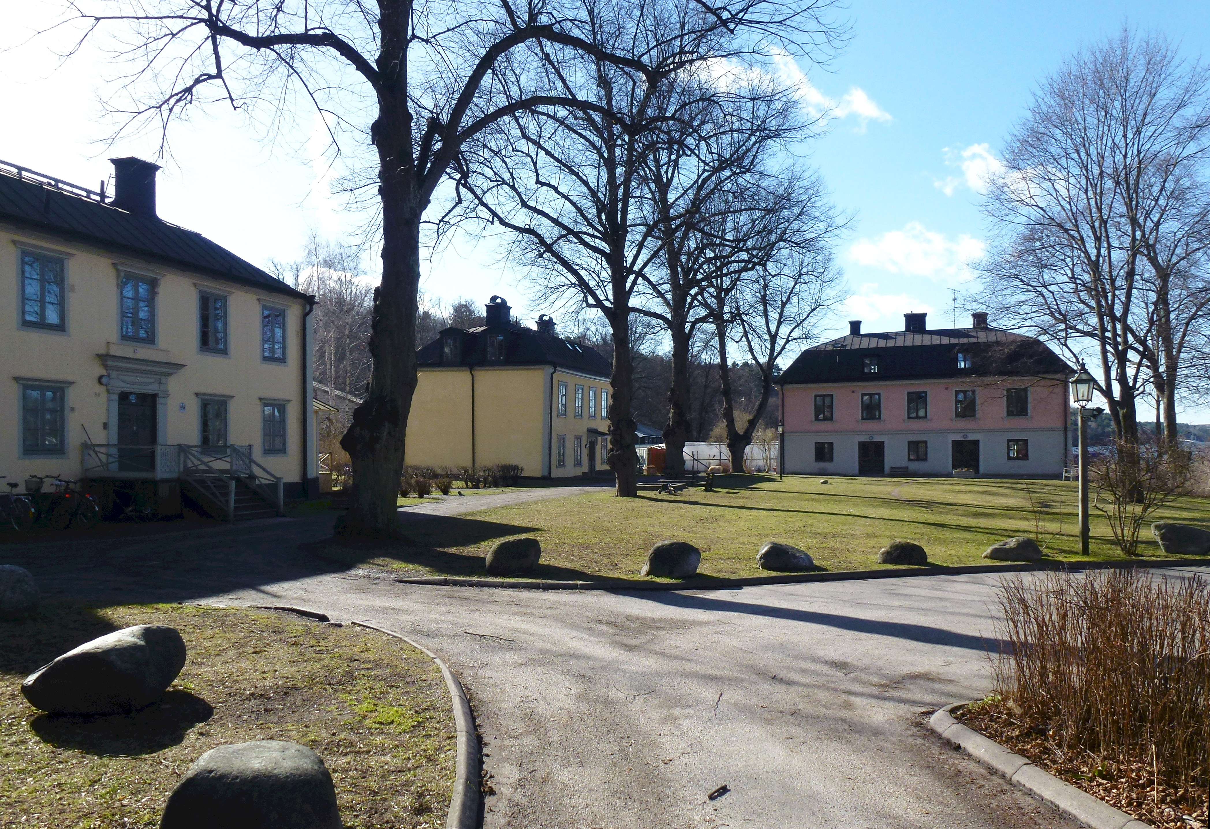 Sundsta gård, huvudbyggnad och flyglar